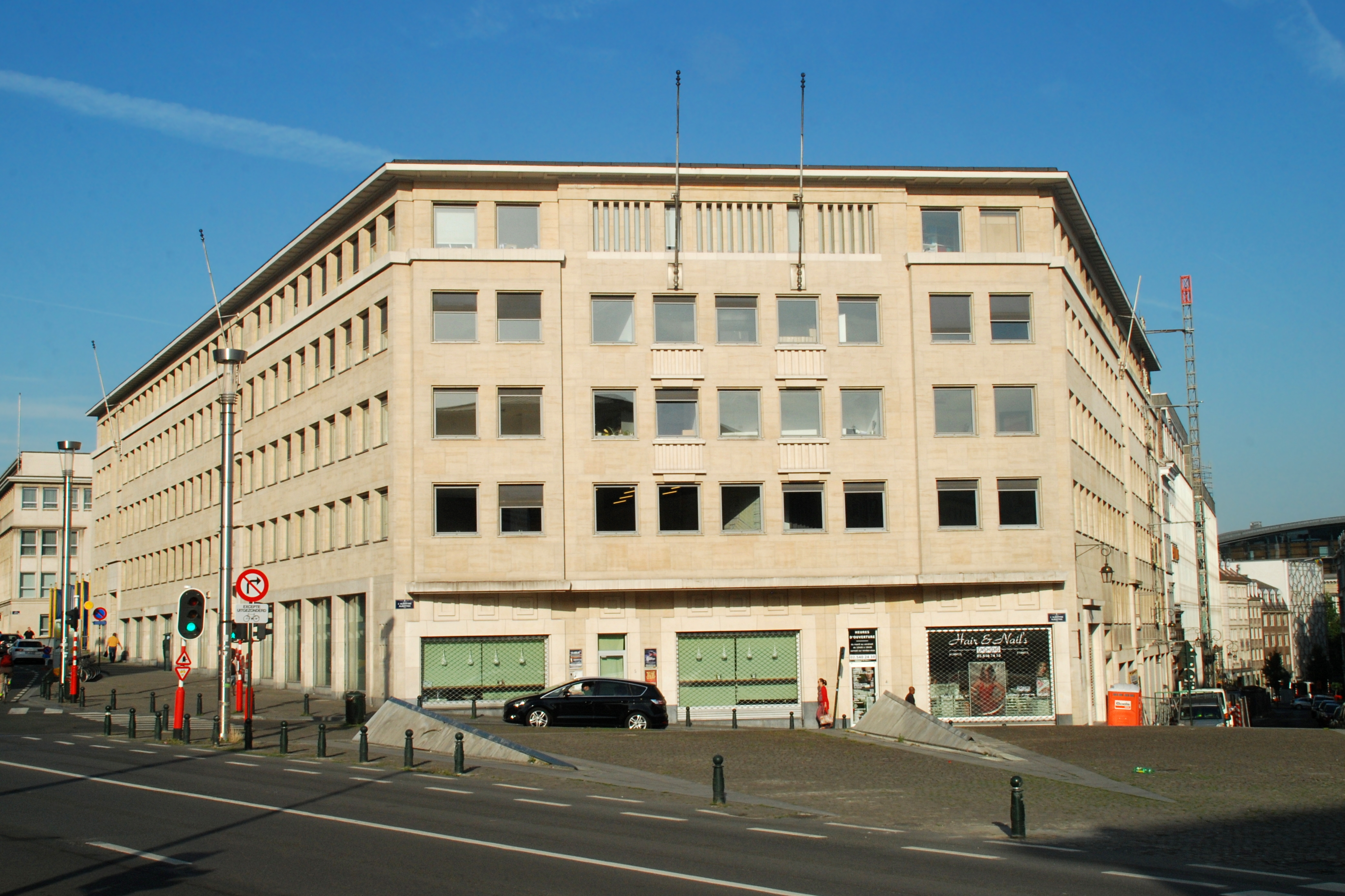 Belgique - Bruxelles - Boulevard de l'Empereur 1 à 5 (Architecture monumentale en Belgique - architecte Philippe Dumont - 1959)